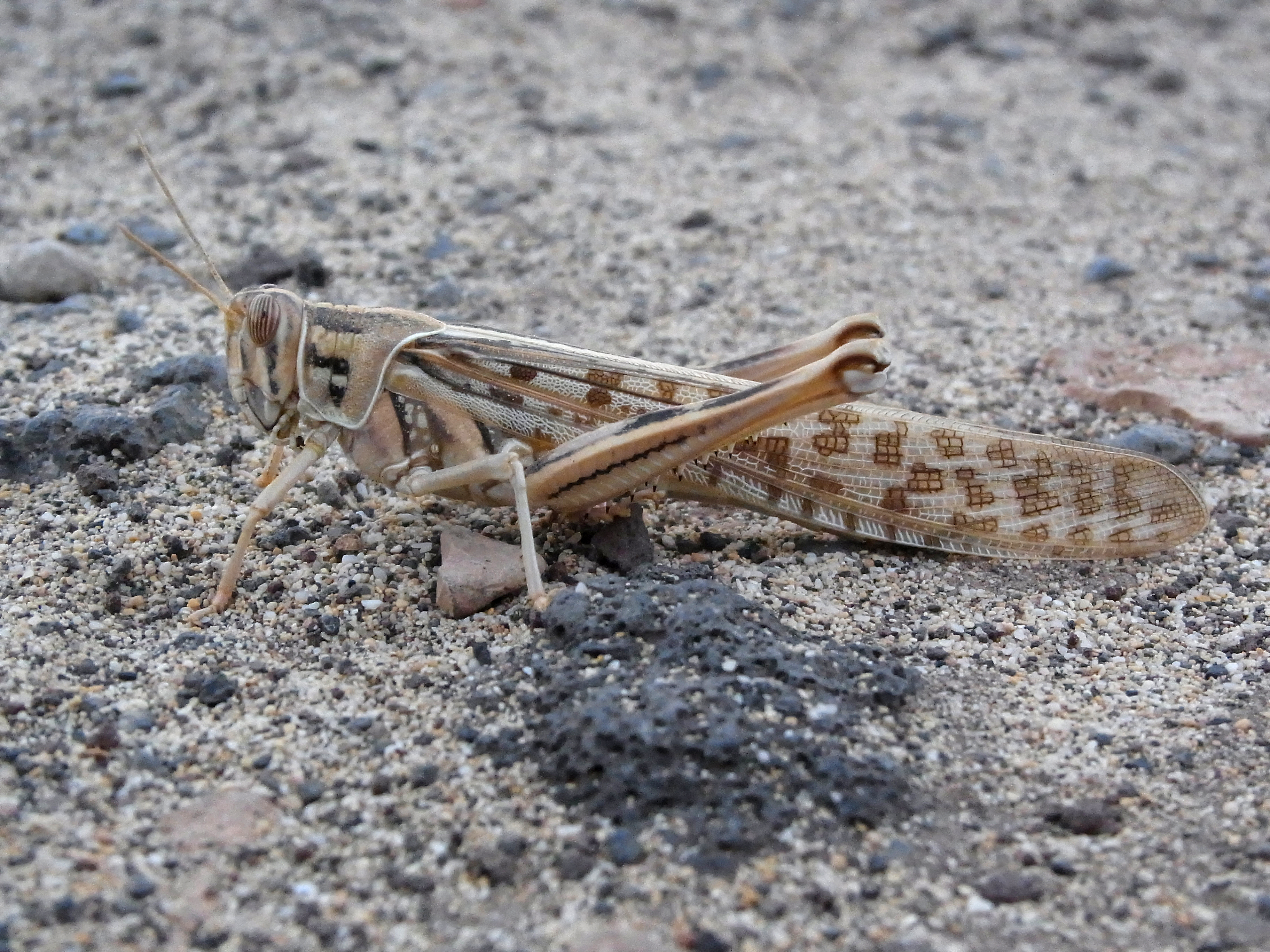 Wüstenheuschrecke (Schistocerca gregaria), Morro Jable, Fuerteventura